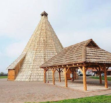 VIGVAM - rekordní nejvyšší vigvam na světě